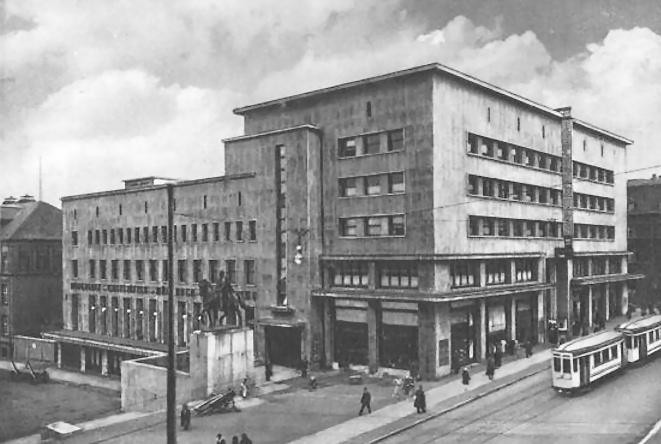 Lichtburg in Essen, an der heutigen Kettwiger Straße, damals Adolf-Hitler-Straße